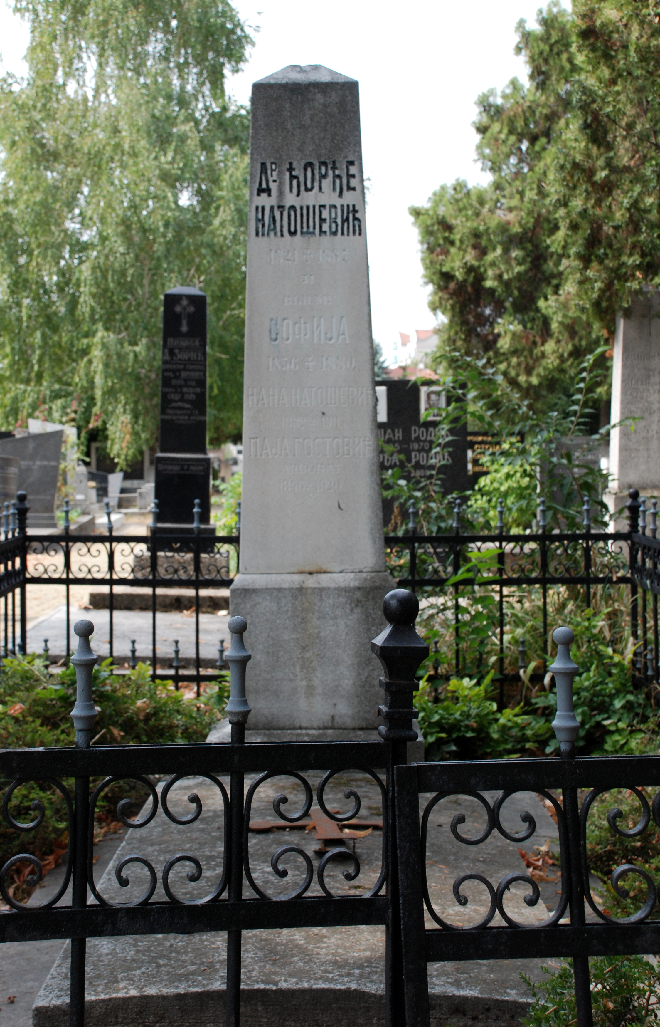 1824-1887, лекар и педагог; реформатор школа, први писац уџбеника према Вуковом правопису, председник Матице српске, аутор школске уредбе, покренуо први педагошки лист ″Школски лист″, први дечји лист ″Пријатељ српске младежи″; народни посланик.